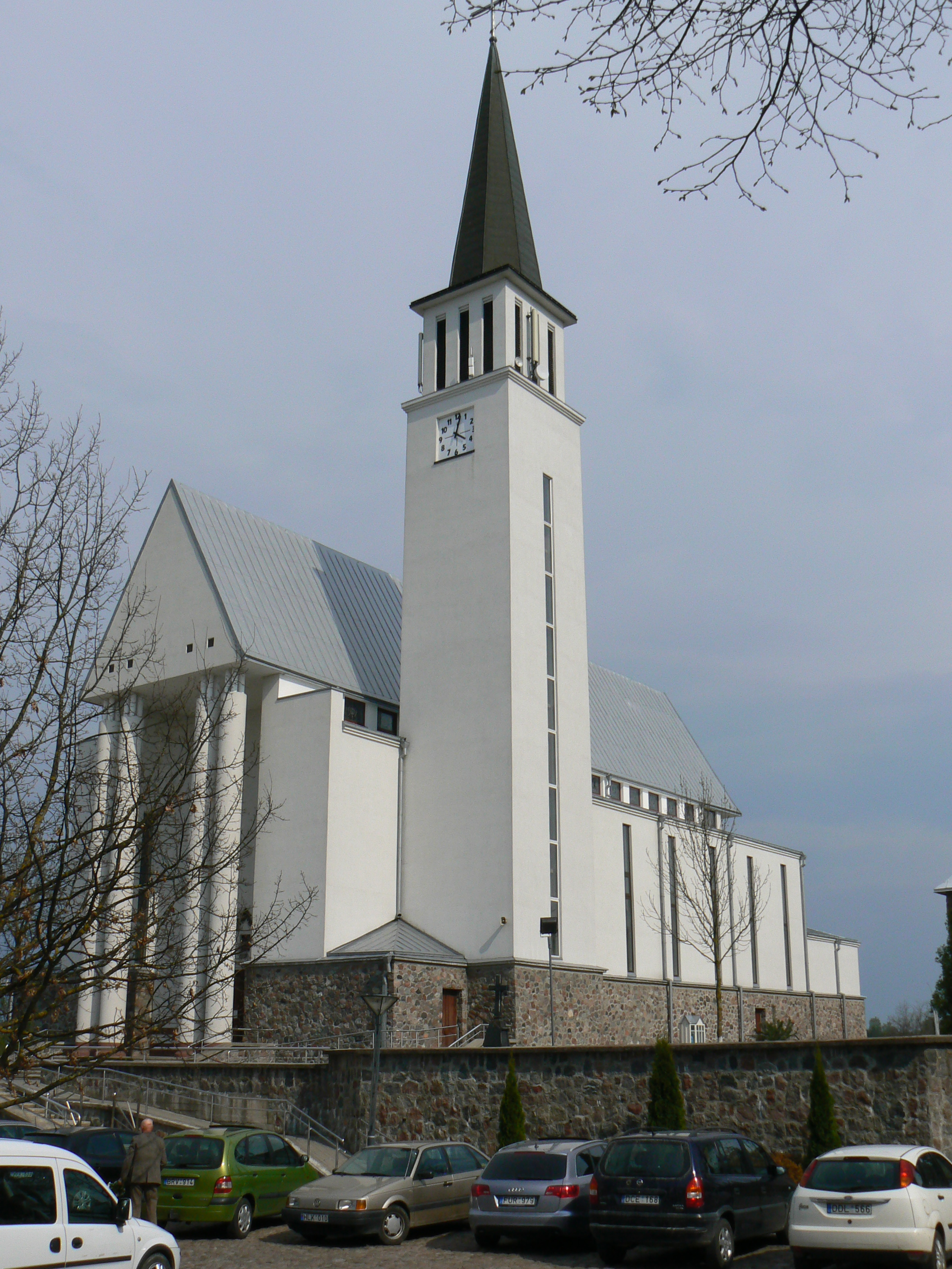 Kostel Sv. archanděla Mikuláše v GargždechLietuvių: Šv. arkangelo Mykolo bažnyčia Gargžduose